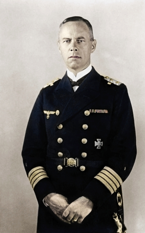 Lütjens, Günther: Admiral, Flottenchef, Kommandant des Leichten Kreuzers "Karlsruhe"